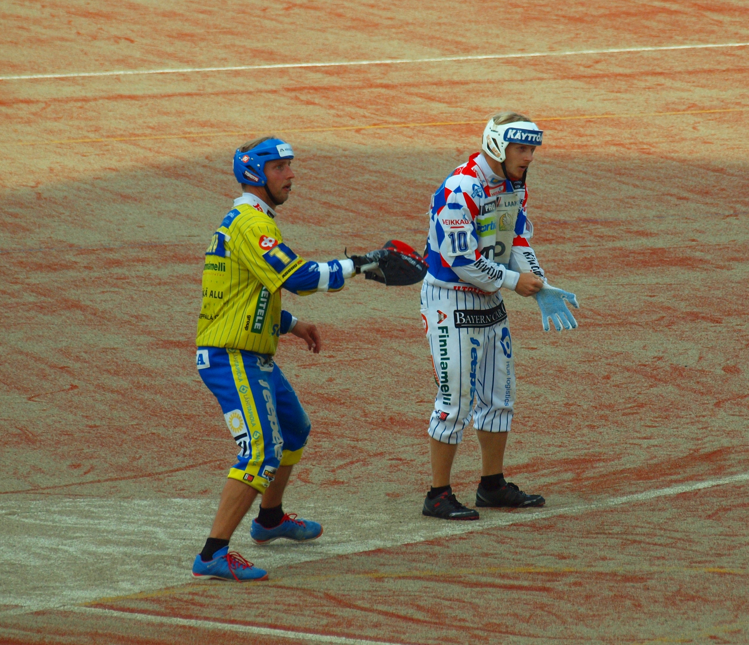 Alajärven Ankkurit - Vimpelin Veto pesäpallo-ottelu 10.8.2014. Kuvassa Aki Orava ja Teemu Isoketo.